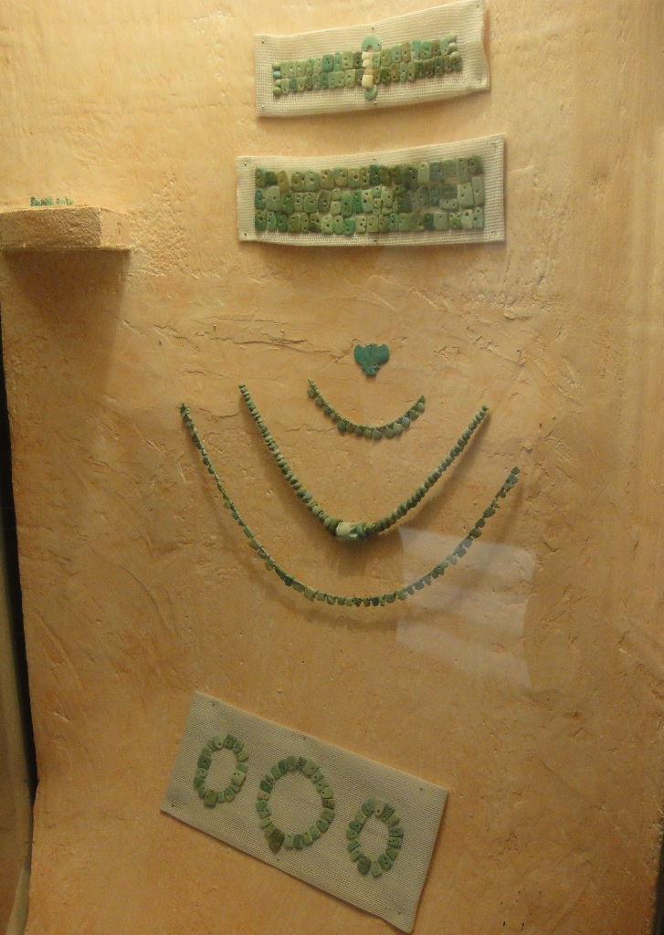 Template:Plazuelas turquoise jewelry